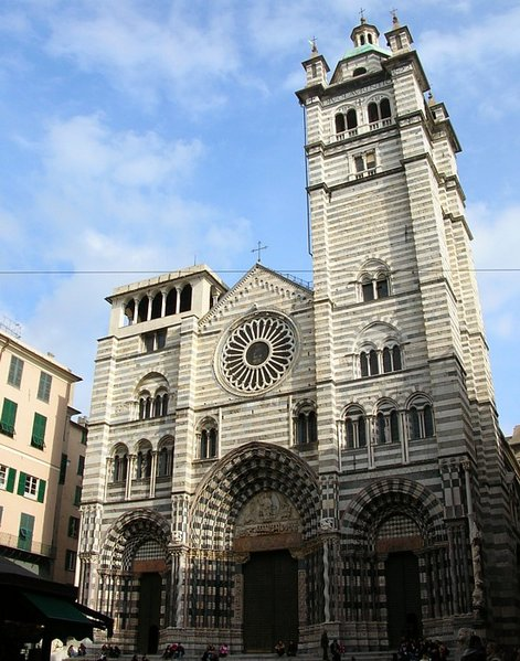 Facciata della Cattedrale di San Lorenzo a Genova. Picture taken by user:Idéfix, january 2005